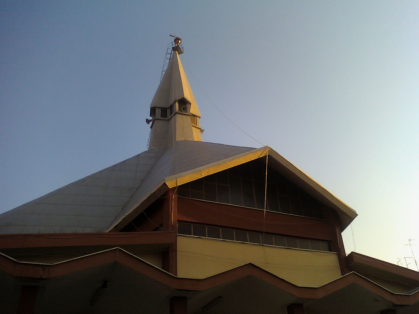 Chiesa della Beata Maria Vergine Regina della Pace al Rione Martucci di Foggia